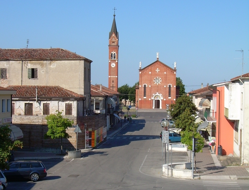 Anguillara Veneta: la chiesa parrocchiale di Sant'Andrea apostolo.